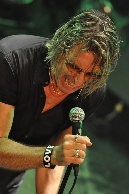 ©Heimo Reifetshammer 2012